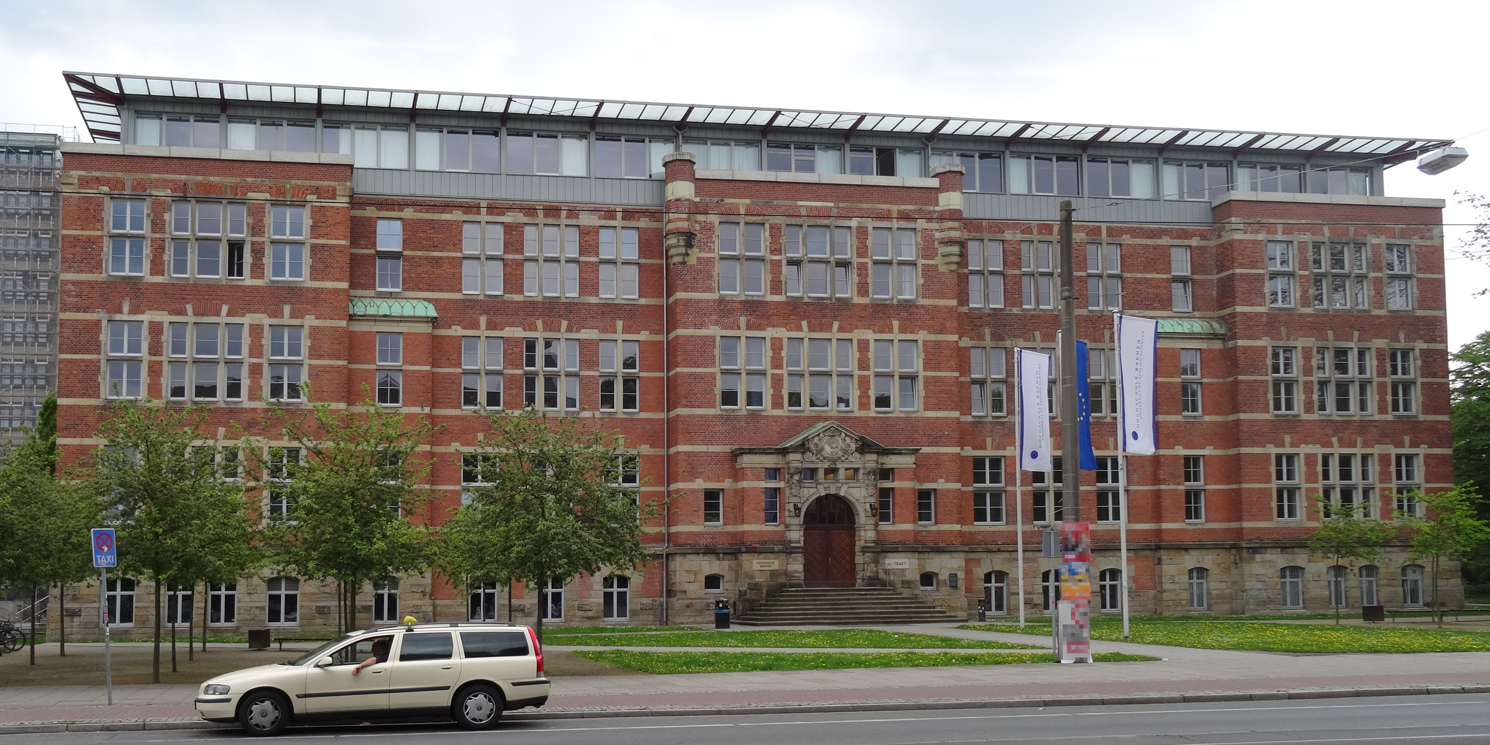 M-Trakt der Hochschule Bremen. Das Gebäude gehört zu den bedeutenden Bremer Bauwerken